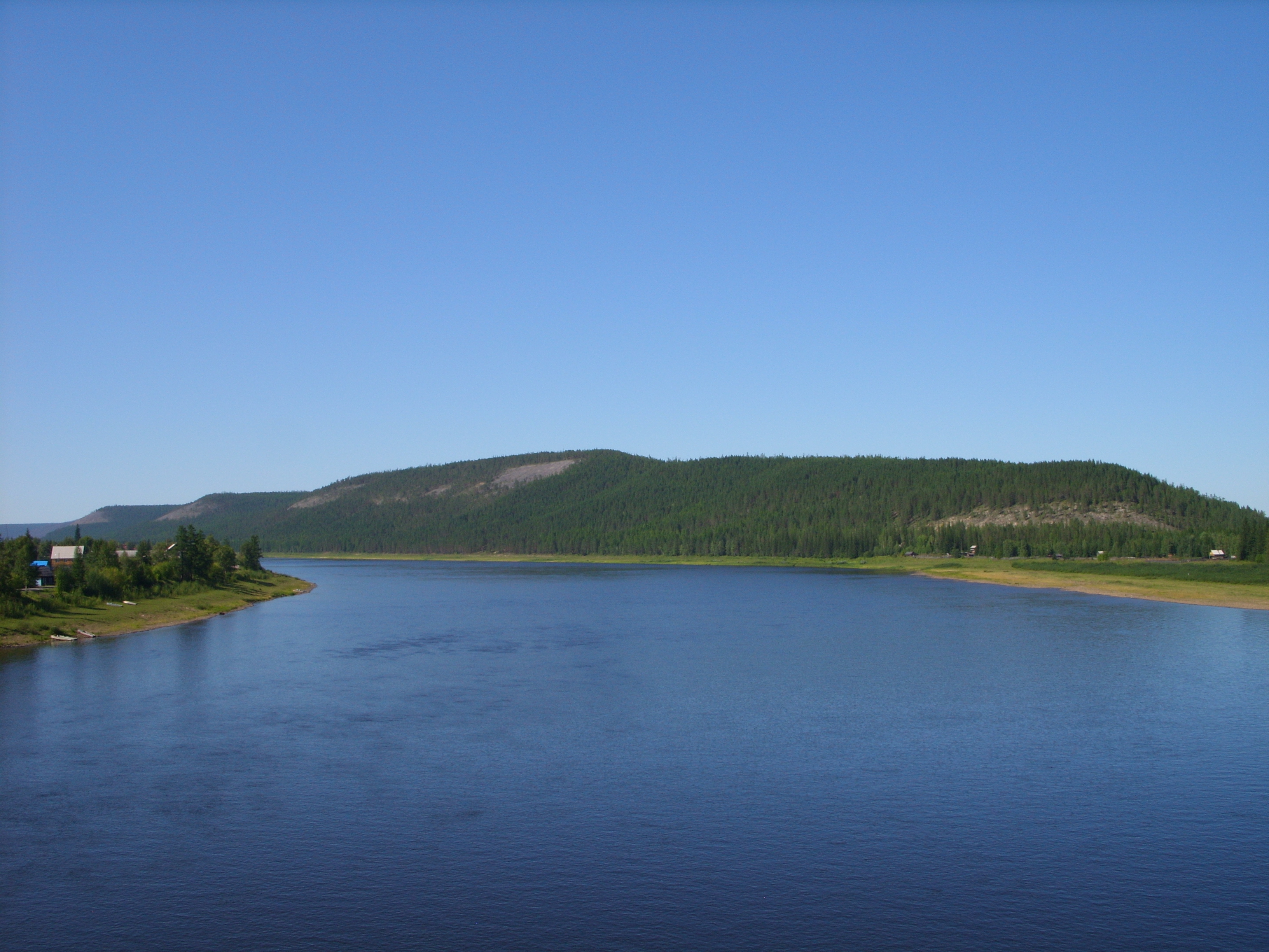 Река Алдан в г. Томмот (Якутия). Вид с ж/д моста на север (вверх по реке). Снимок августа 2011 г.